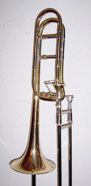 Tenorposaune in "open wrap"-Bauweise und Thayer-Ventil; Hersteller: Courtois Paris